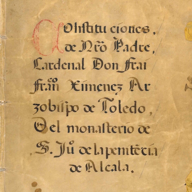 Constituciones del 11 de octubre de 1508 del monasterio de San Juan de la Penitencia, de la Tercera Orden de San Francisco. Otorgadas en Alcalá de Henares, por el Arzobispo de Toledo y primado de las España el Cardenal Cisneros. Documento que consta de 32 páginas.